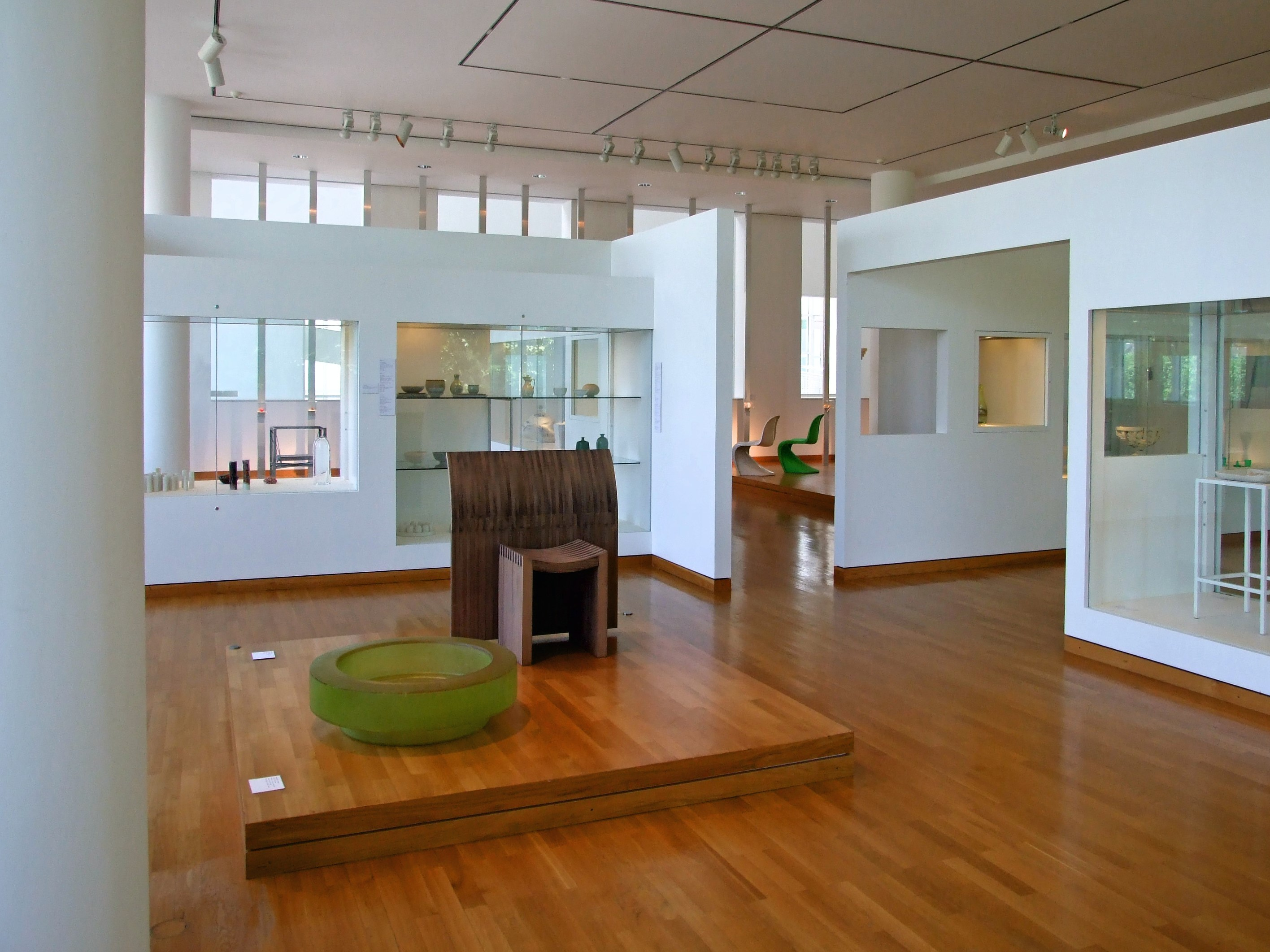 Innenansicht des Museums für Angewandte Kunst in Ffm